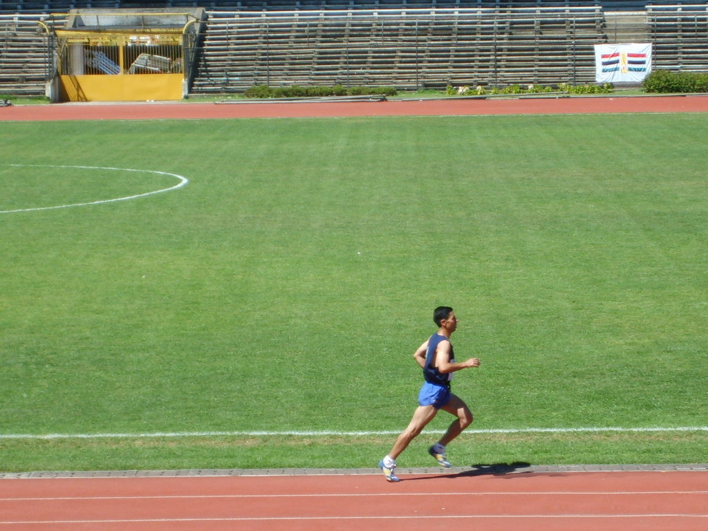 senior athlete, in Estadio Municipal de Concepción, Chile